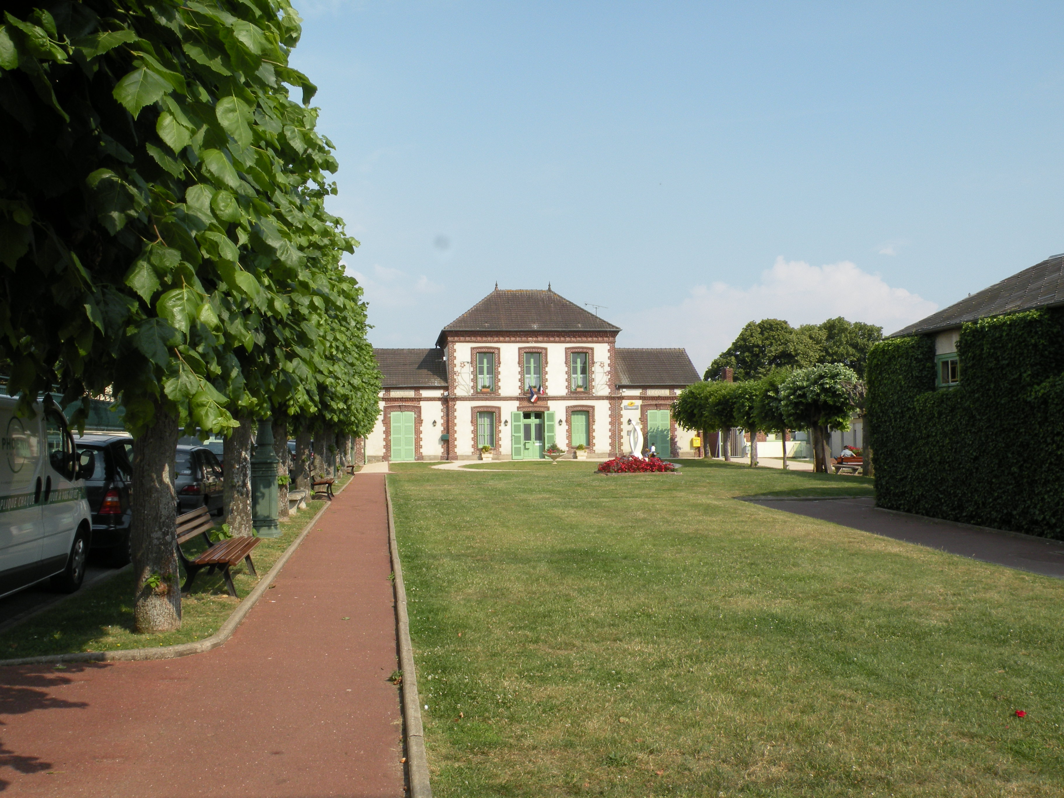 mairie de Villeneuve-les-Sablons